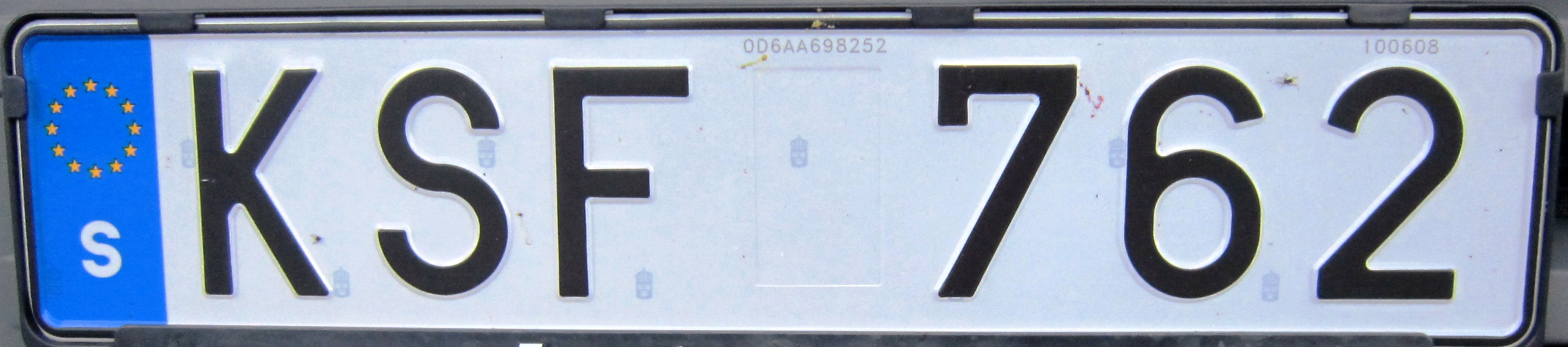 Zweden kenteken EU